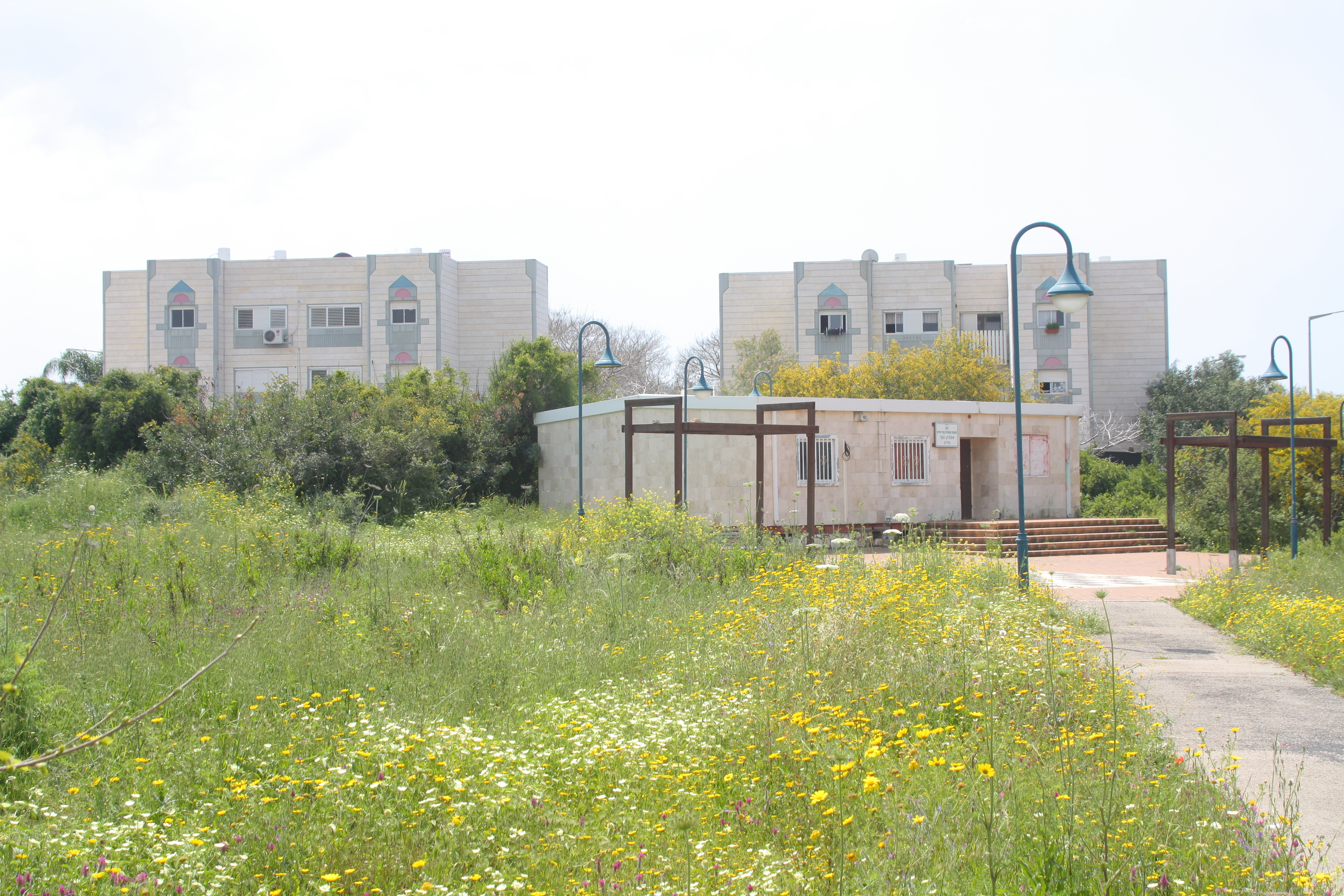 חריש Harish